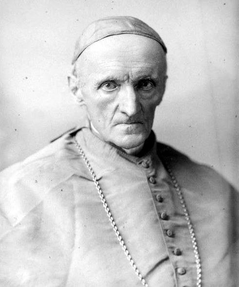 Henry Edward Manning